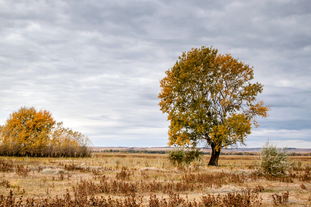 Донская степь в Волгоградской области